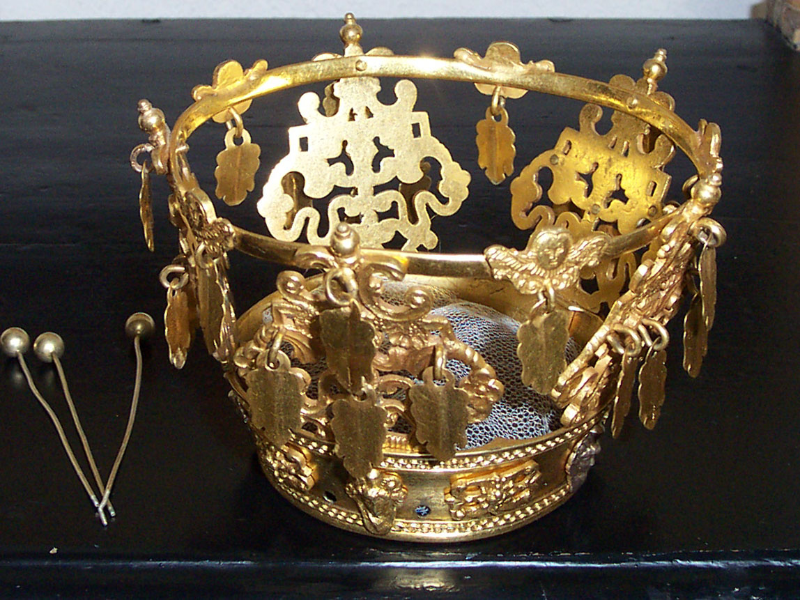 Brudkrona av guldplätterad gulmetall troligen tillverkad i Sollerö/Moraområdet under förra hälften eller mitten av 1800-talet, Skänkt till Grangärde kyrka 1919